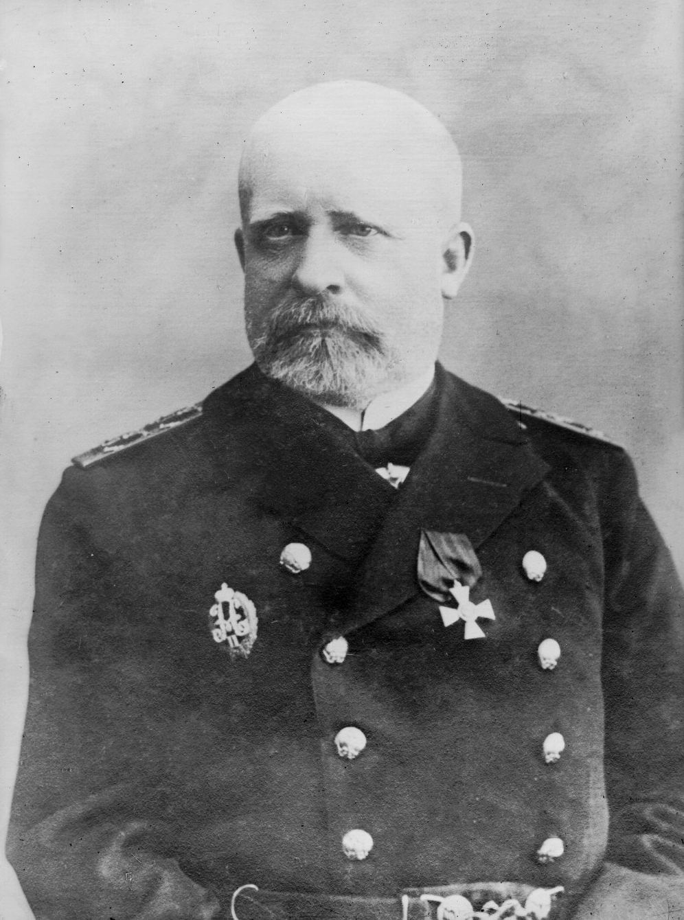 Nikolaï Ottovich von Essen [vice-amiral russe] : [photographie de presse] / [Agence Rol]